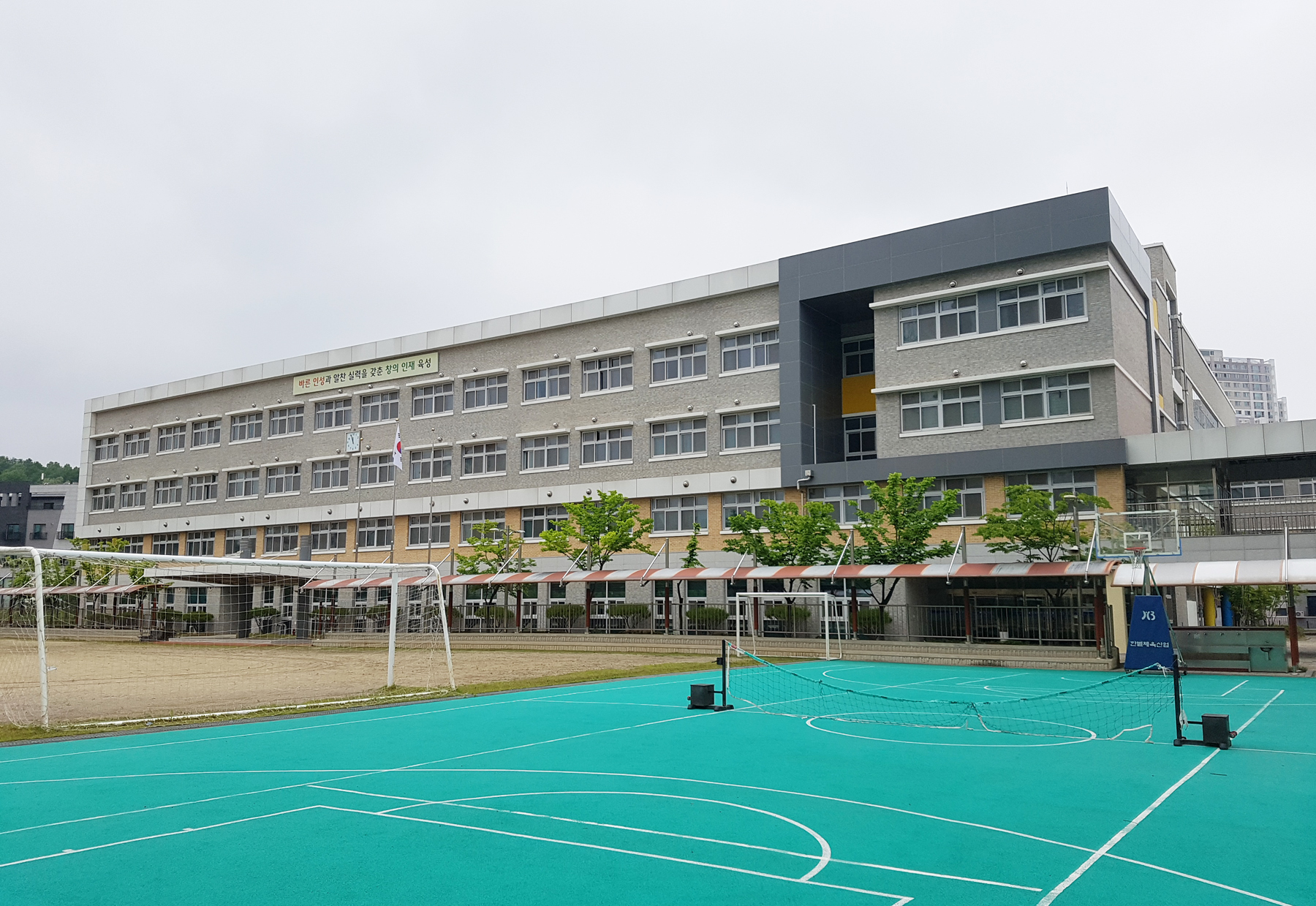 천안불당고등학교